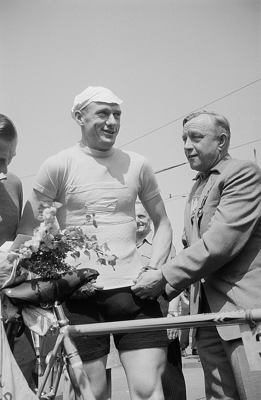 Original image description from the Deutsche Fotothek Bild 31 Eluf Dalgaard